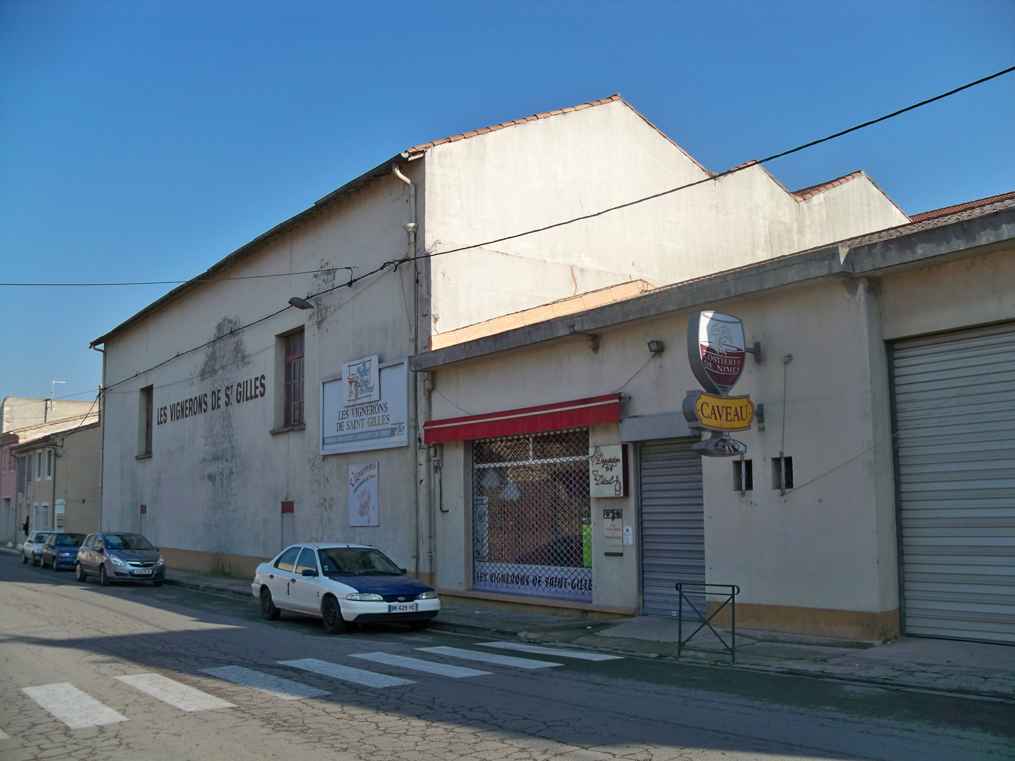 Cave Coopérative de Saint Gilles du Gard (30)